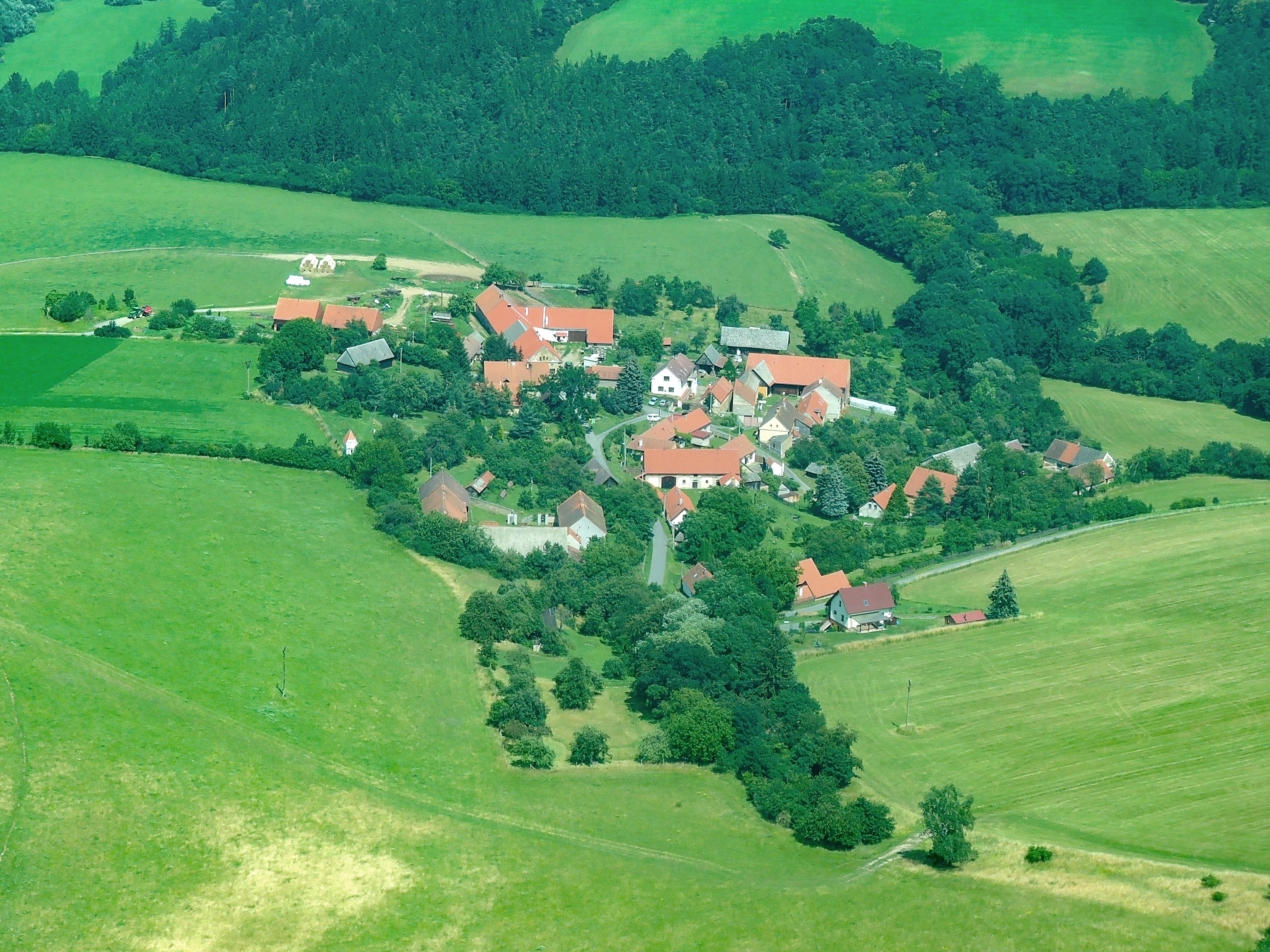 Pohled na Kalubice (okr. Rakovník) z letadla